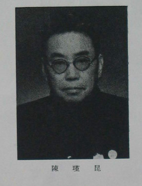 中國人民政治協商會議第一屆全體會議代表